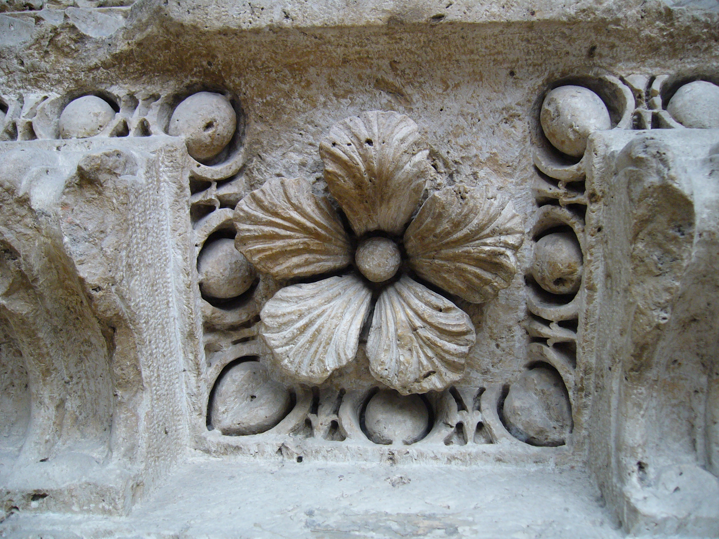 Zbliżenie elementu wystawy Muzeum w Pergamonie.